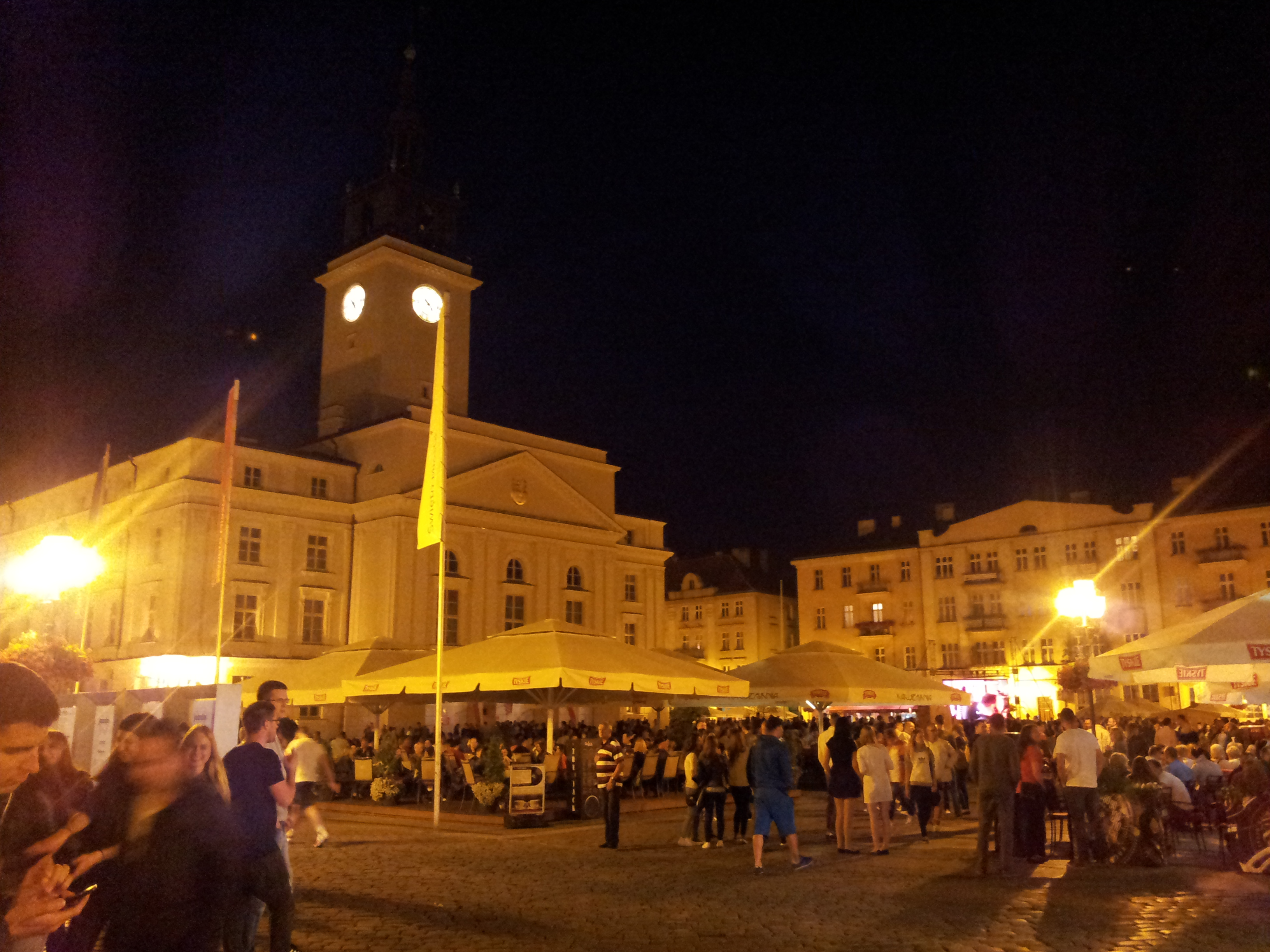 Rynek nocą